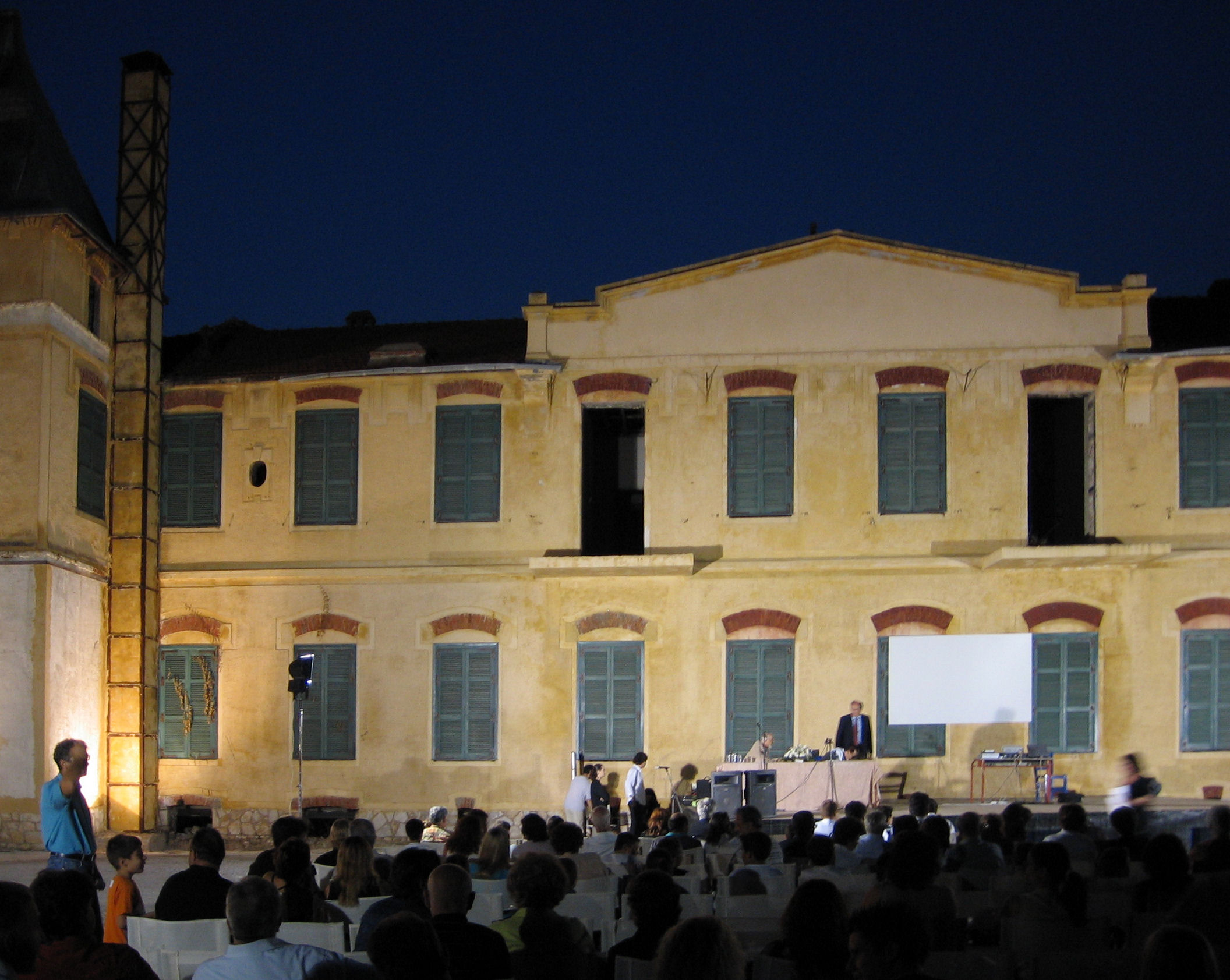 Projekt-Information der IGME an der Rückfront des Palati, Limenaria (2005)